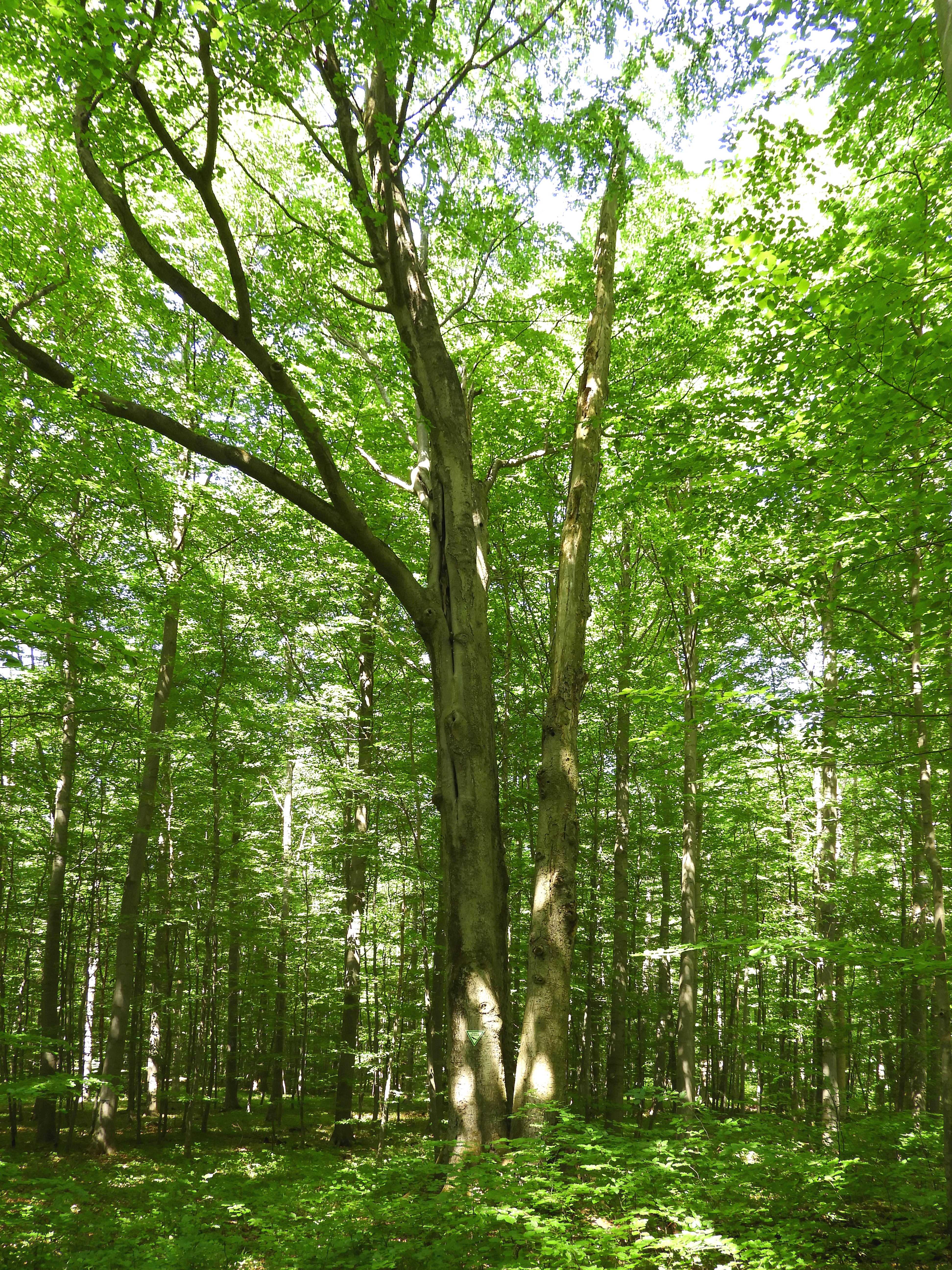 Die "Vier-Buchen" auf dem Rücken des Karnberg im nordhessischen Werra-Meißner-Kreis sind ein ausgewiesenes Naturdenkmal mit der Nummer 636.645. Unter der Baumgruppe, die auch "Schwedenbecher" genannt wird, soll ein in einer Schlacht des Dreißigjährigen Krieges gefallener schwedischer General begraben liegen. Nach einer alten Überlieferung wurden die Buchen von vier ihren General beerdigenden Soldaten auf das frische Grab gepflanzt.